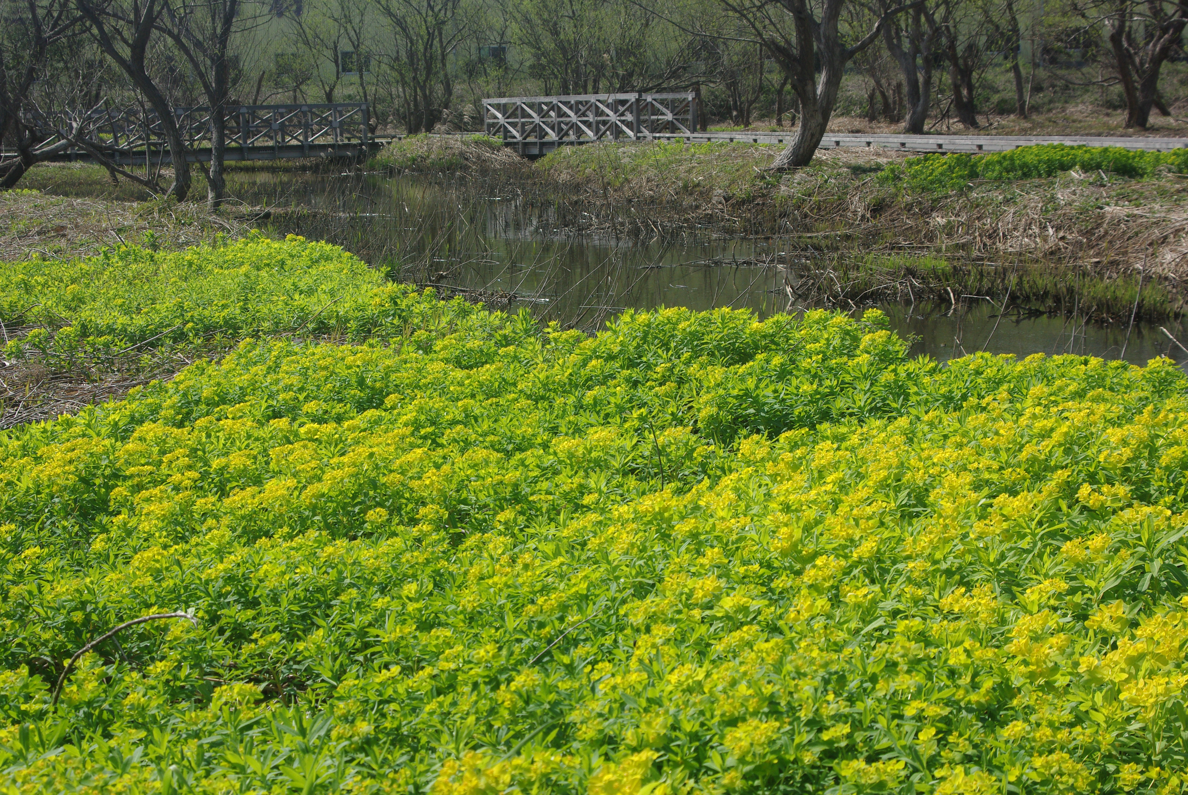 ノウルシ（静岡県富士市 浮島ヶ原自然公園で撮影）